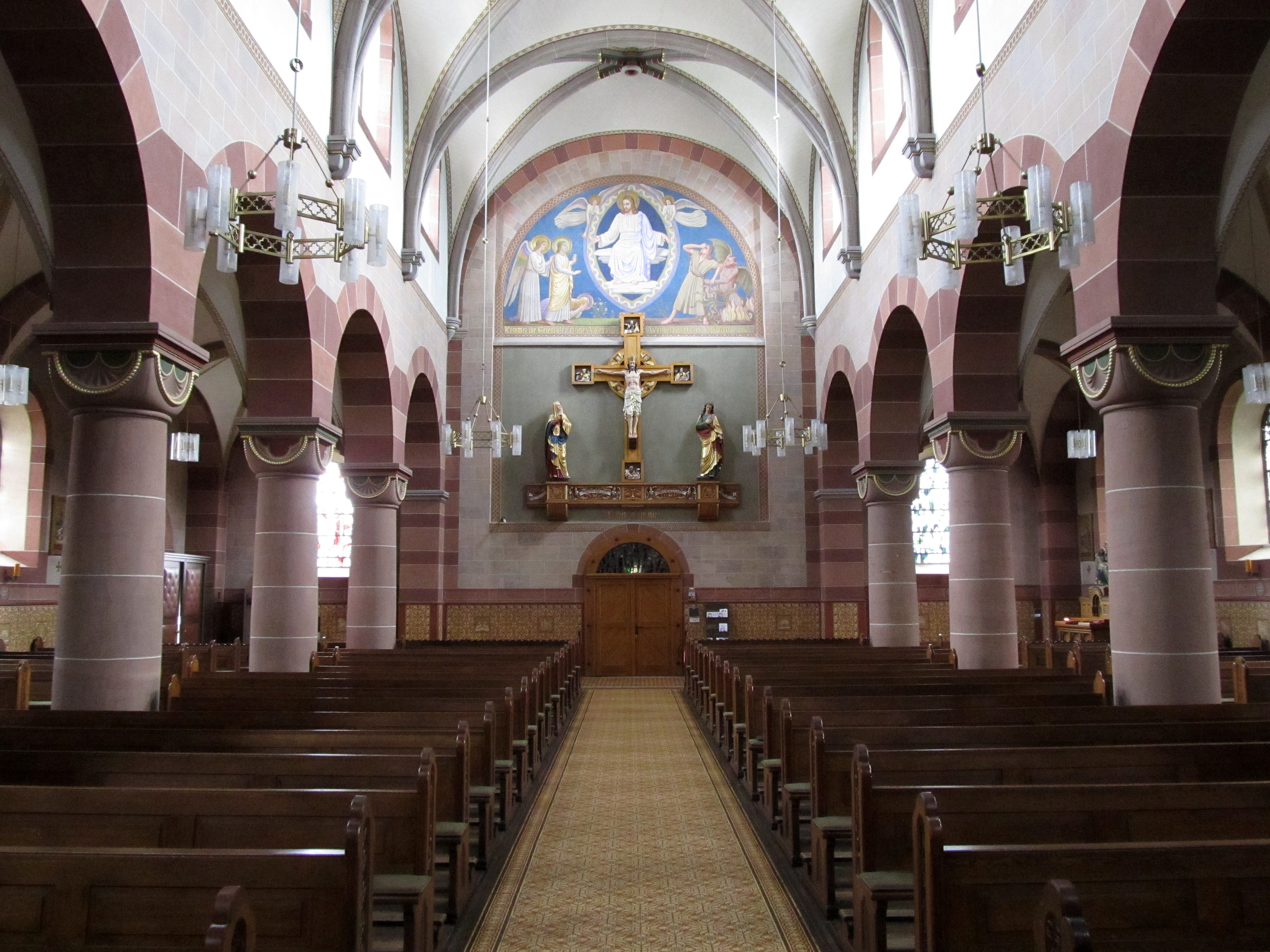 Blick ins Innere der katholischen Pfarrkirche St. Remigius in Bliesen, einem Stadtteil von St. Wendel, Saarland